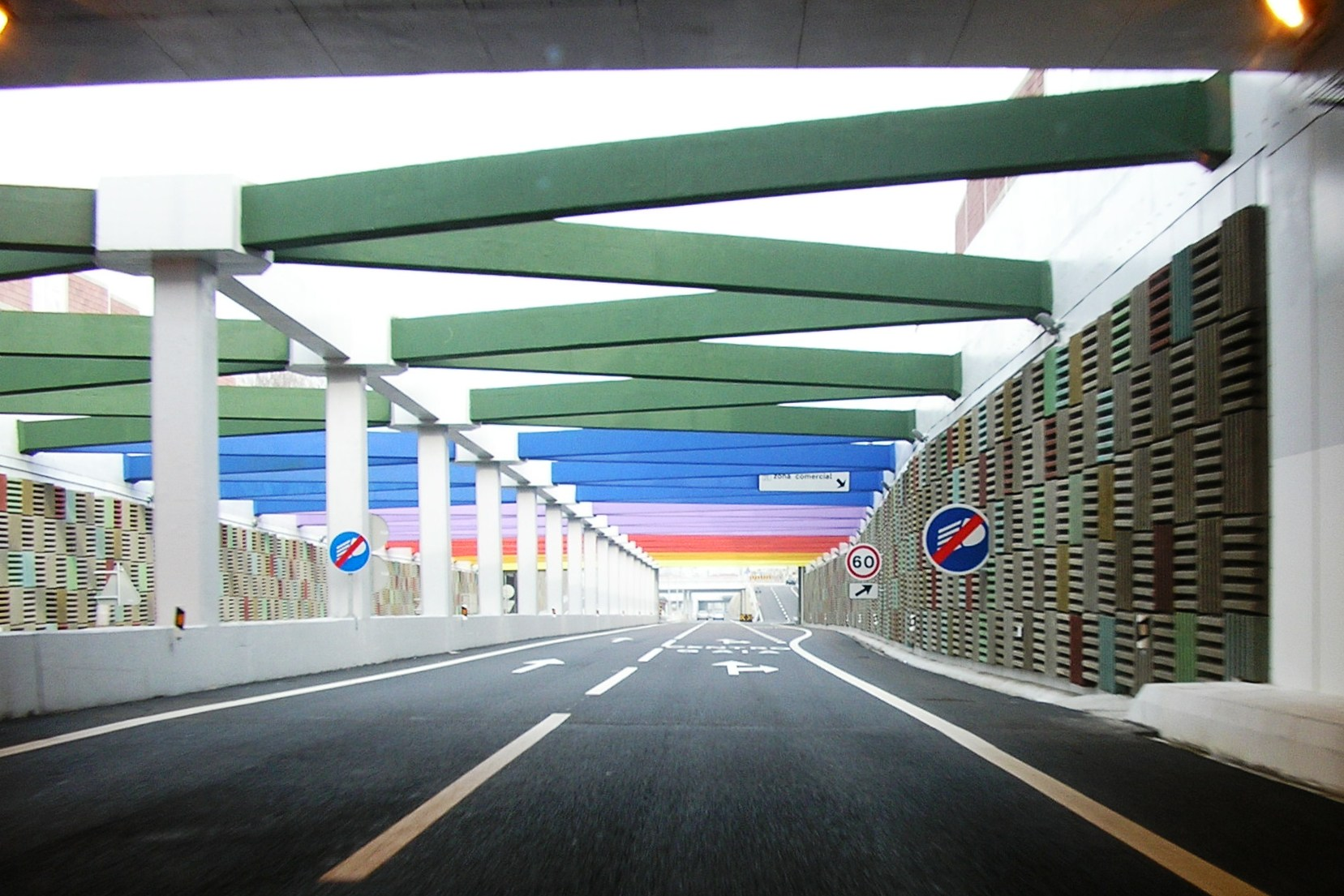 "Via de Cintura Interna" (VCI) in Vila Nova de Gaia, Porto city region, in Portugal. Author: Manuel de Sousa.